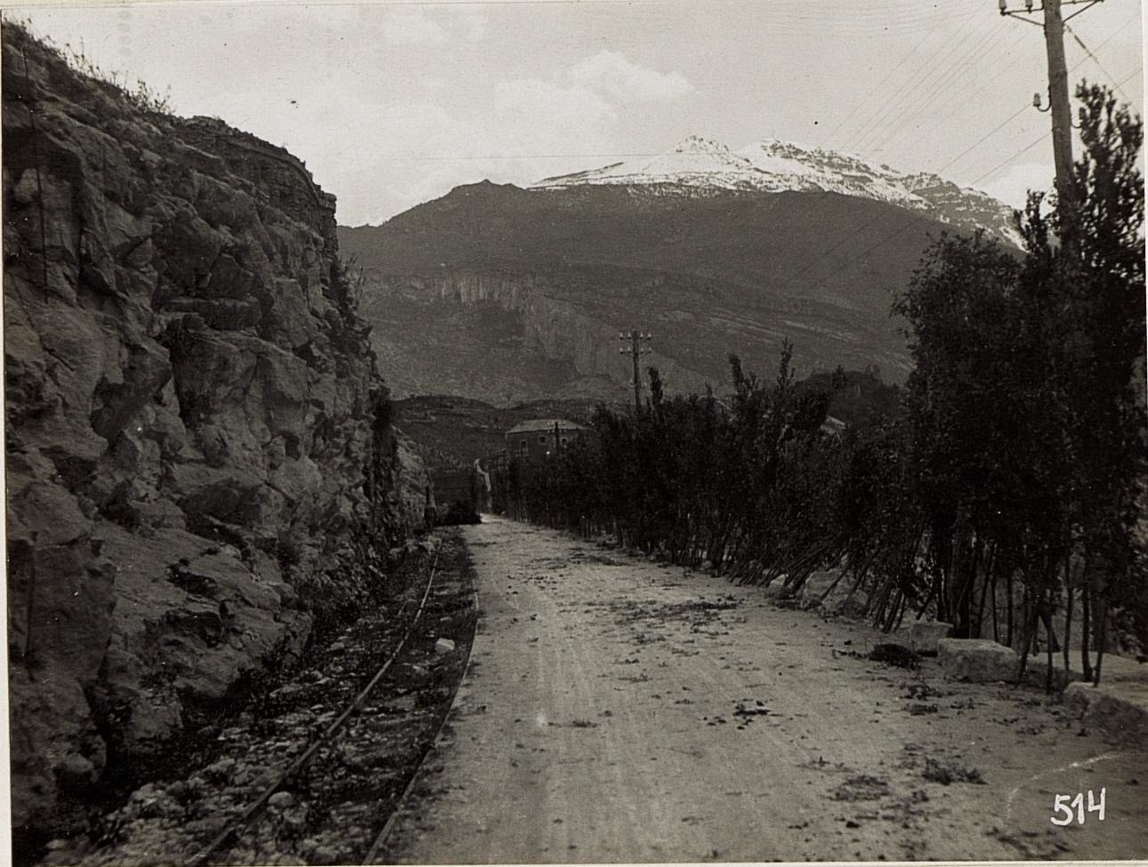 Straßensperre Nago, im Hintergrund Altissimo.